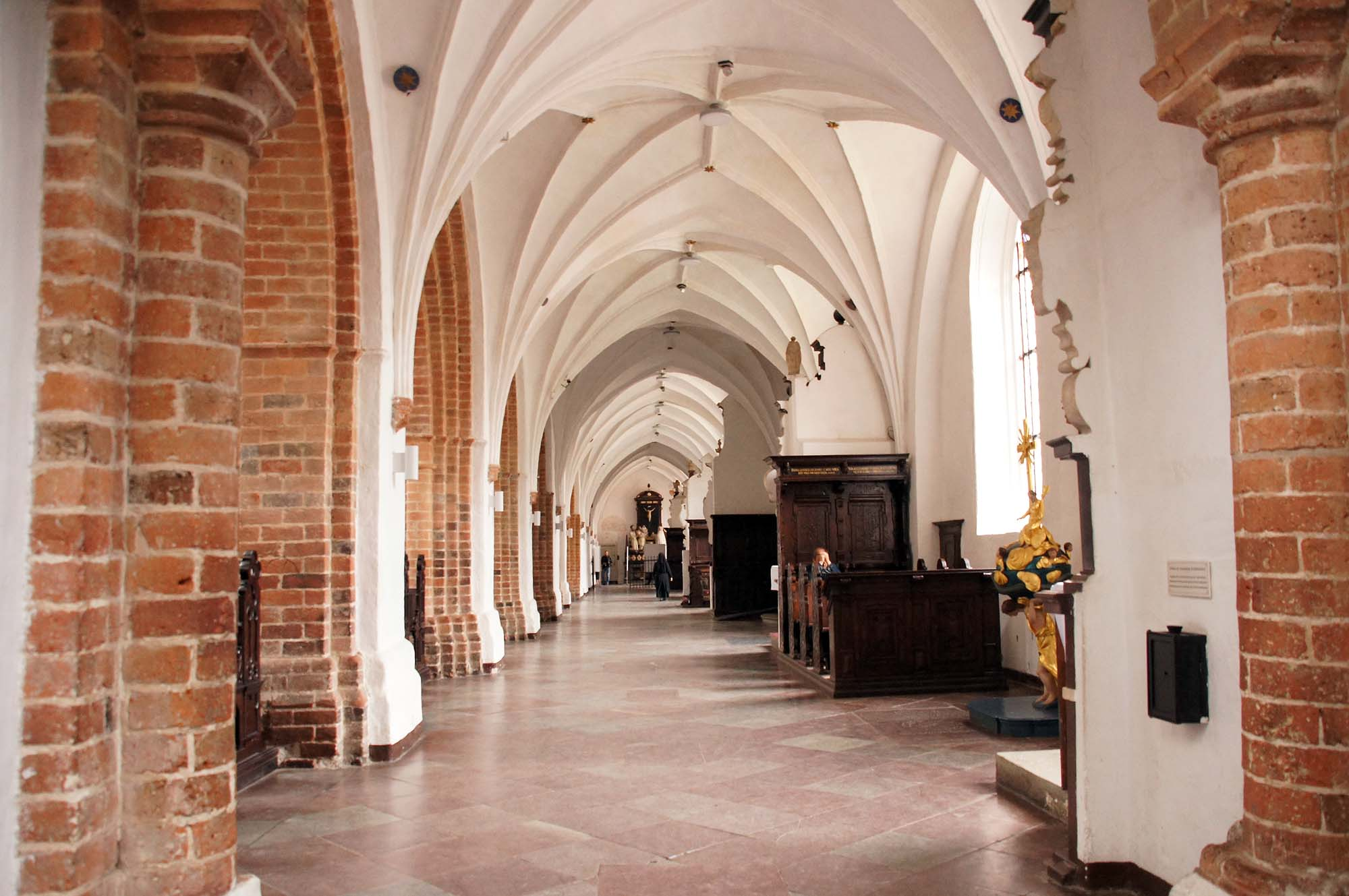 Gdańsk, Archikatedra Oliwska, nawa boczna.